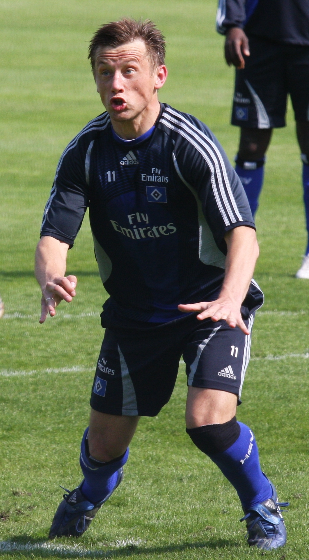 Ivica Olic beim Training an der HSH Nordbank Arena